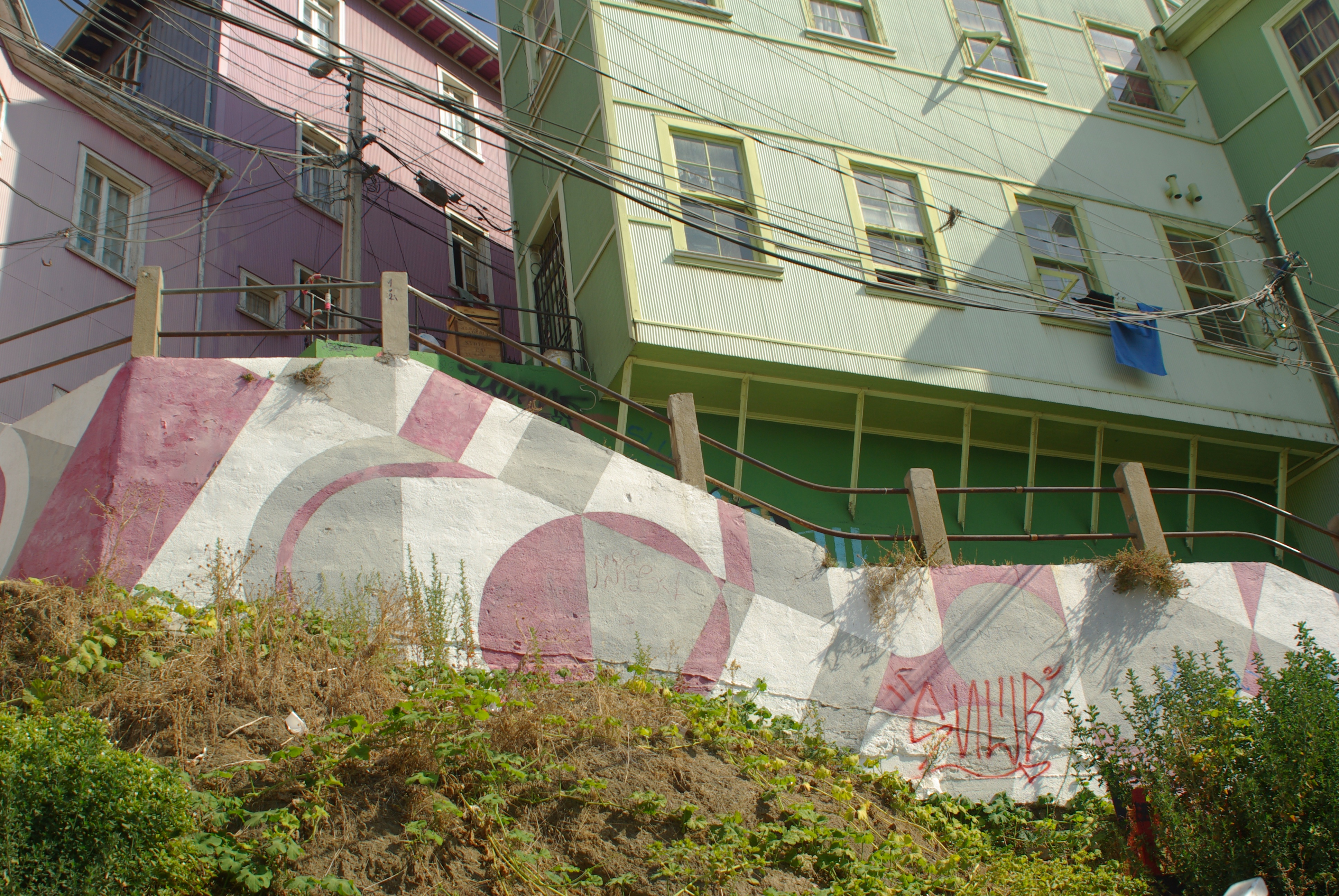 Soportes de casas en el aire